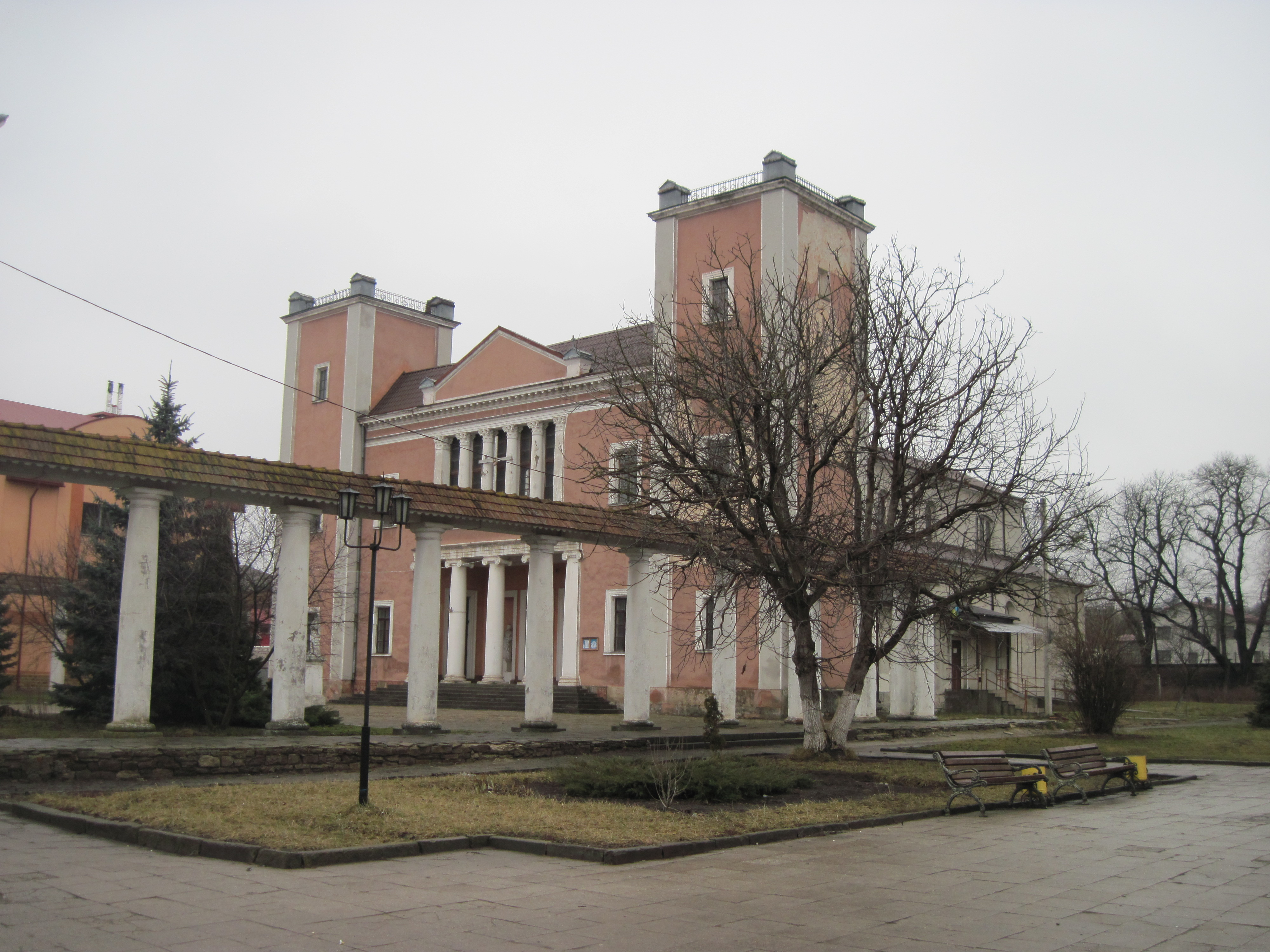 Костел святих Петра і Павла, Теребовля, січень 2015